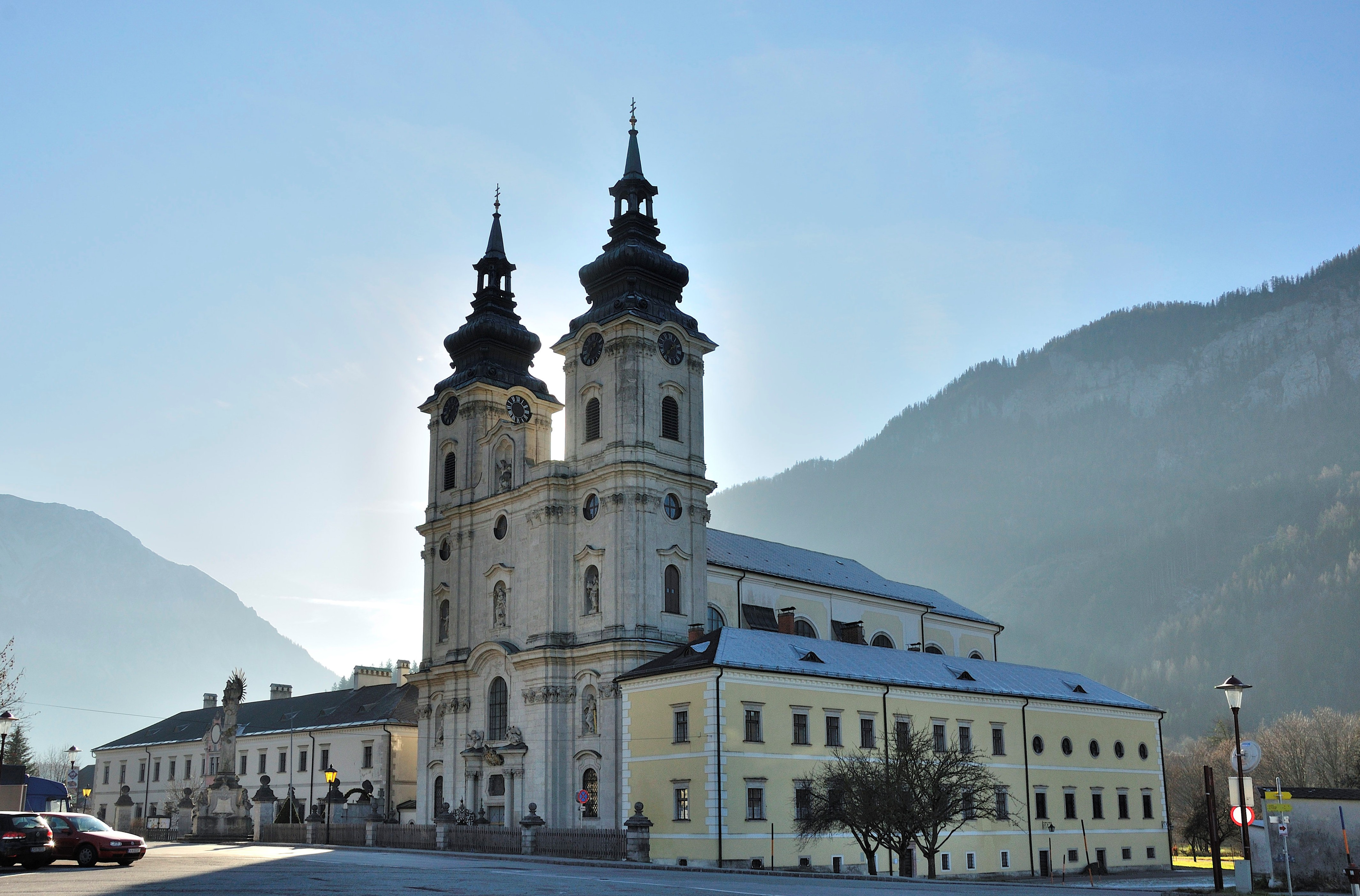 Gesamtanlage ehem. Stift Spital am Pyhrn